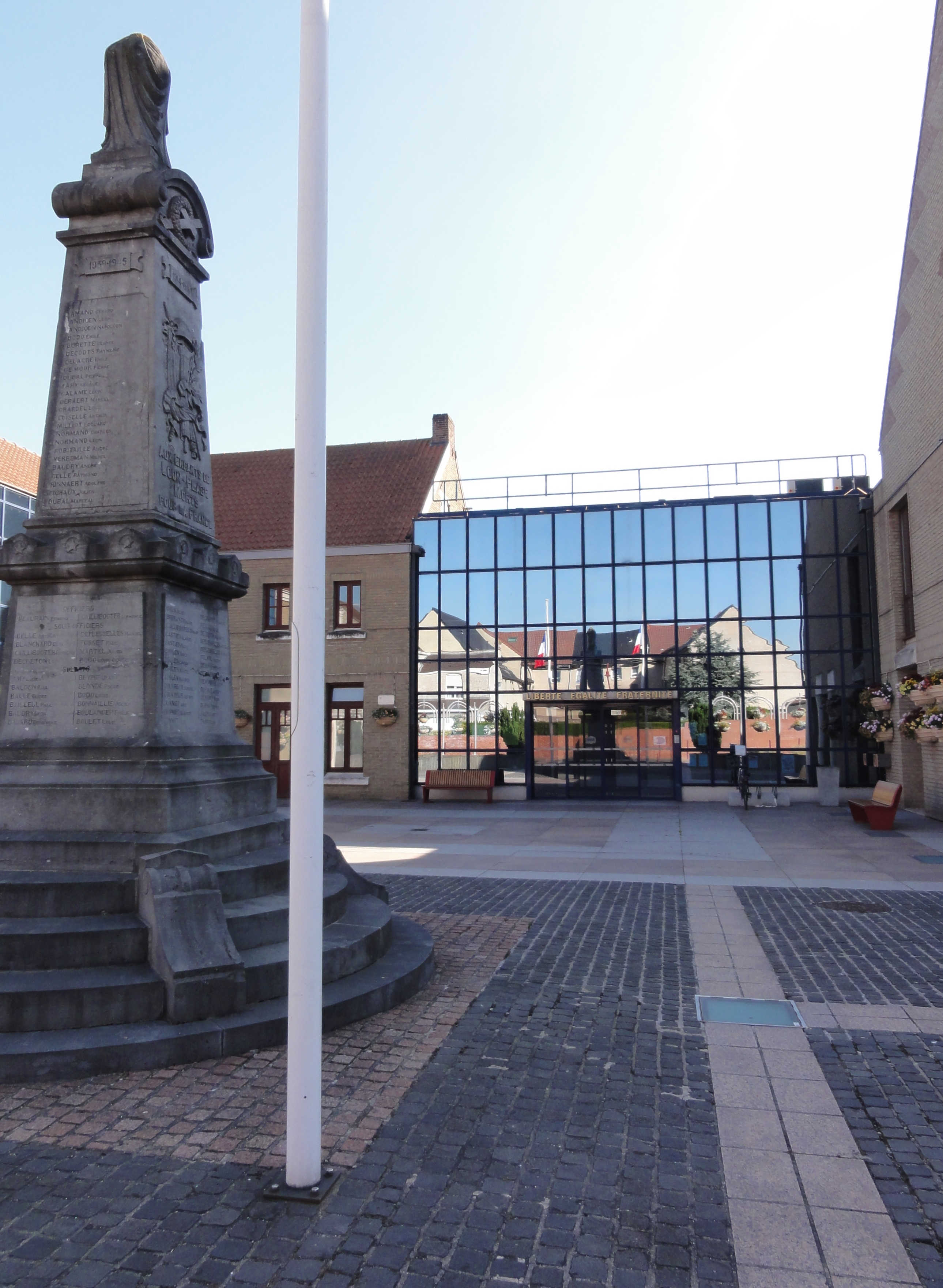 Loon-Plage (Nord) mairie et monument aux morts